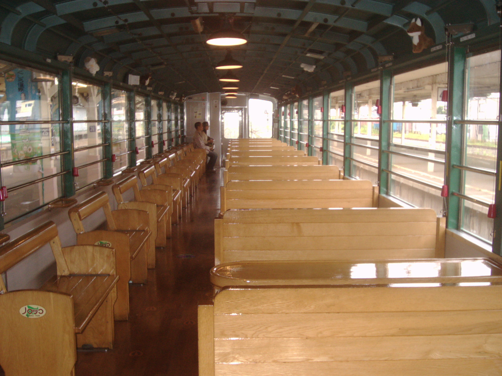 JR北海道オクハテ510-1車内 (釧路駅にて)